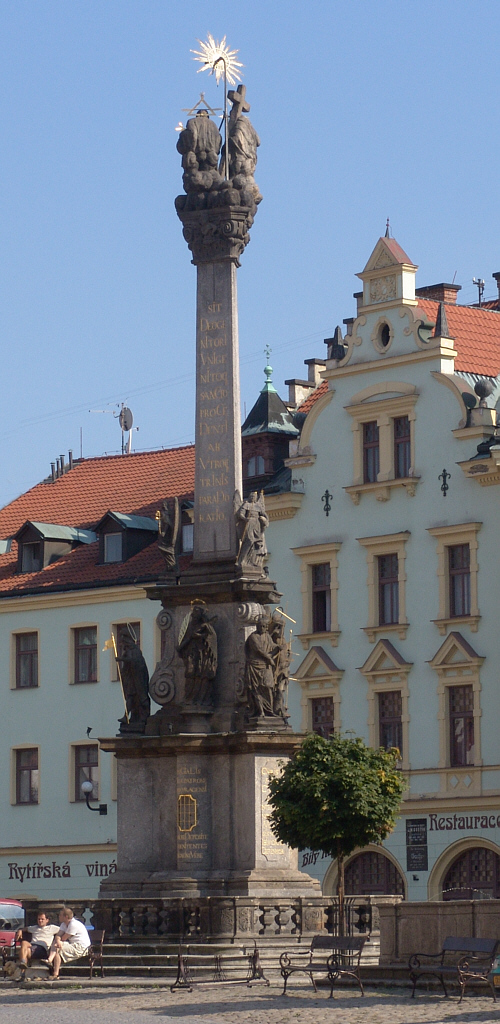 Dreifaltigkeitssäule in Loket (deutsch: Elbogen). Die Pläne stammen von Johann Karl Stilp (2005) Fotograf: Walter J. Pilsak, Waldsassen Copyright Status: GNU Freie Dokumentationslizenz